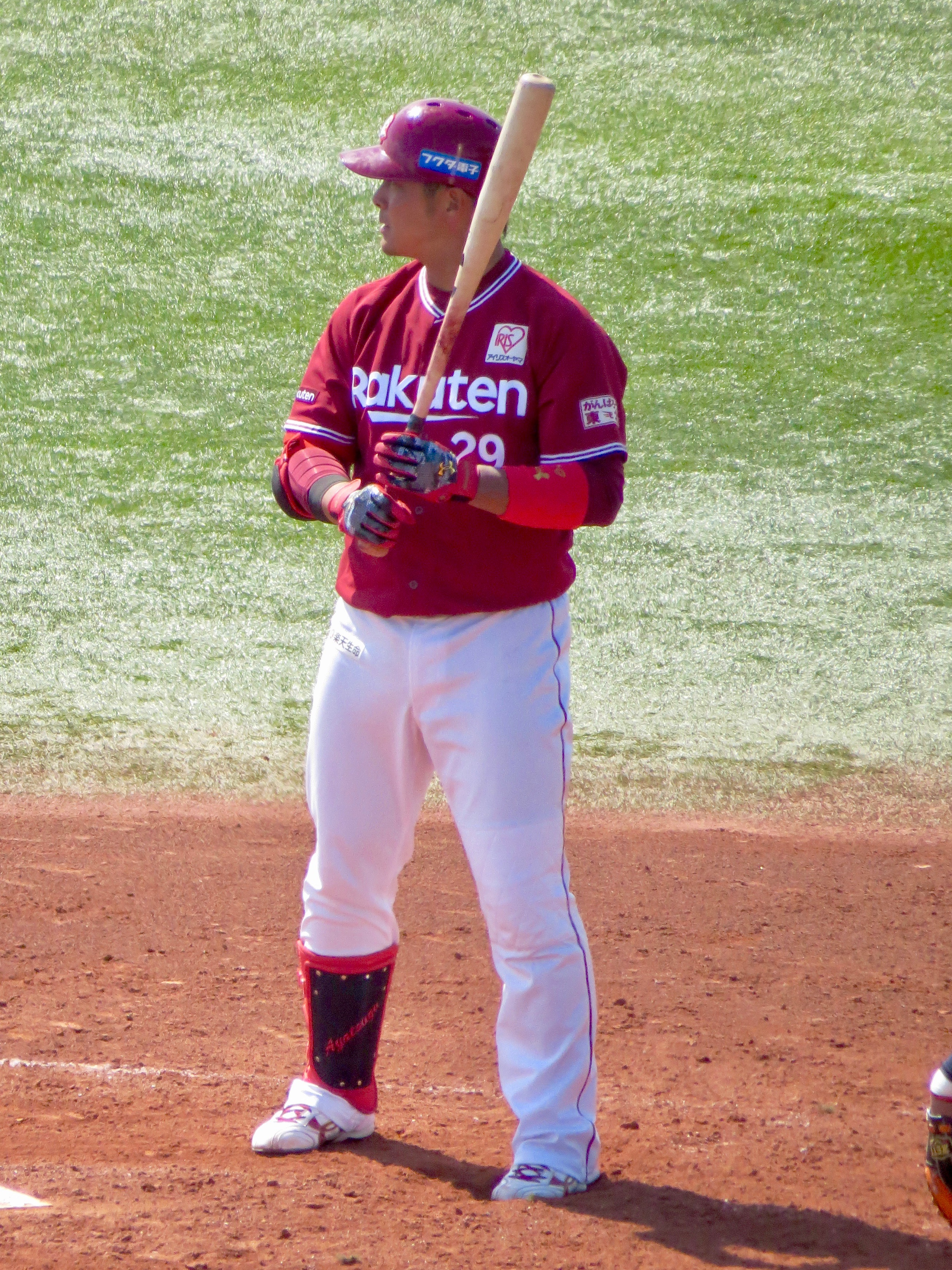 東北楽天ゴールデンイーグルスの選手「山下斐紹」。ヤクルト戸田球場にて。